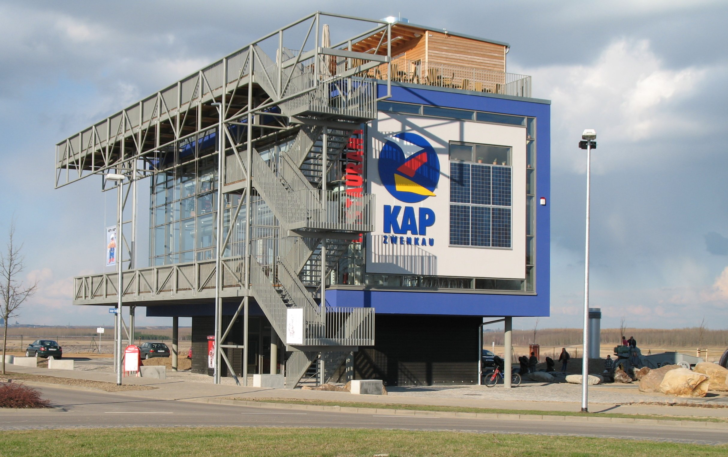 Ausstellungspavillion in Zwenkau am Kap Zwenkau am 4.4. 2006